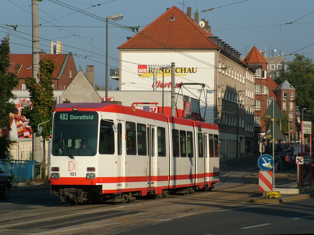 Tramcar 151 (type N) of the Dortmunder Stadtwerke / DSW 21 at Heinrichstrasse stop Stadtbahnwagen 151 (Typ N) der Dortmunder Stadtwerke an der Haltestelle Heinrichstraße Picture taken by myself / selbst fotografiert (User:Stefan Kunzmann)